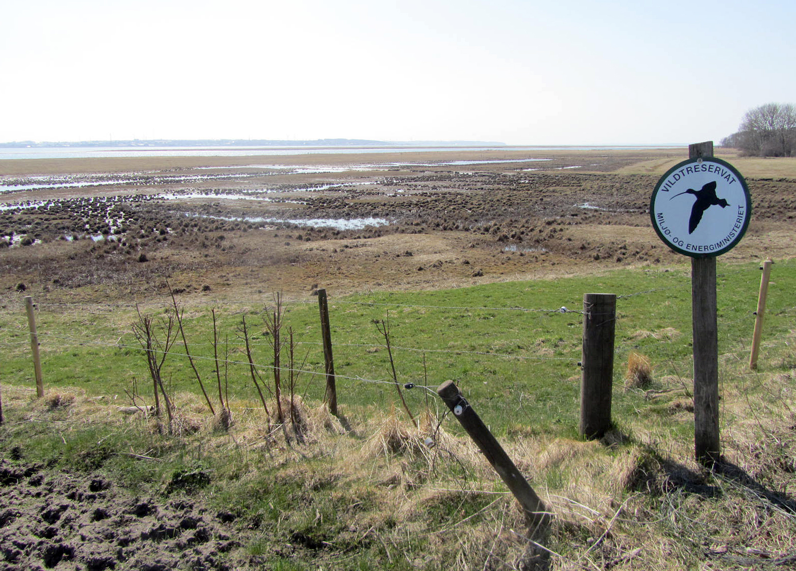 Aggersborggård Vildtreservat